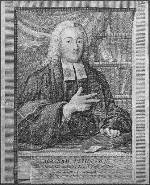 Porträtt av kyrkoherden Abraham Pettersson. Kategori: (09) Porträtt Porträtt av kyrkoherden Abraham Pettersson (1724-1763).